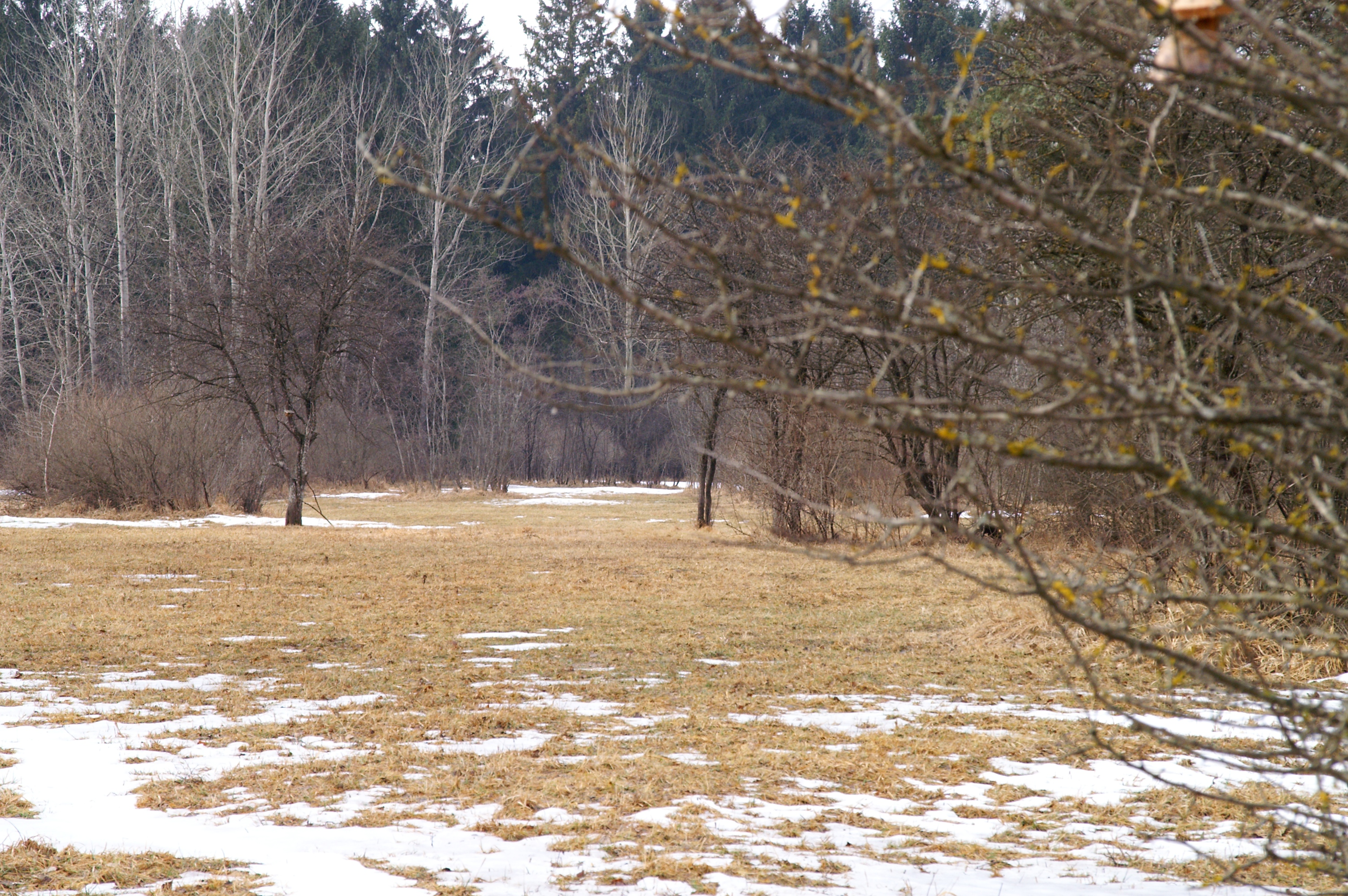 Halbtrockenrasen im Februar